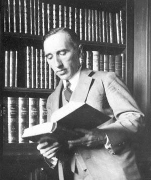 Wilhelm Weizsäcker (1886-1961), německý právník a profesor právní historie